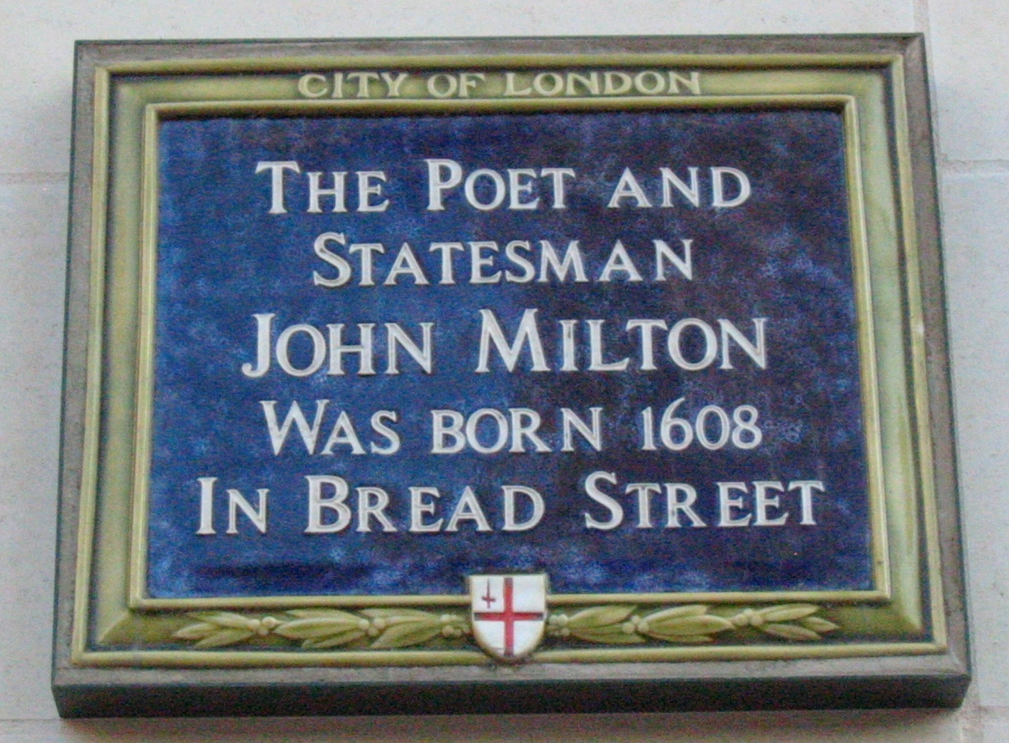 Nrf: Pliaque à Londres